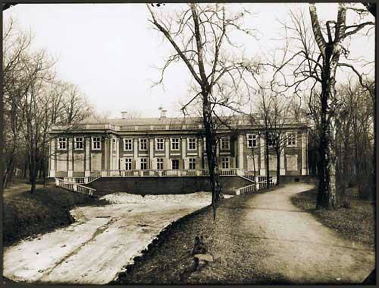 Екатерингофский дворец. Фото конц. 19 века